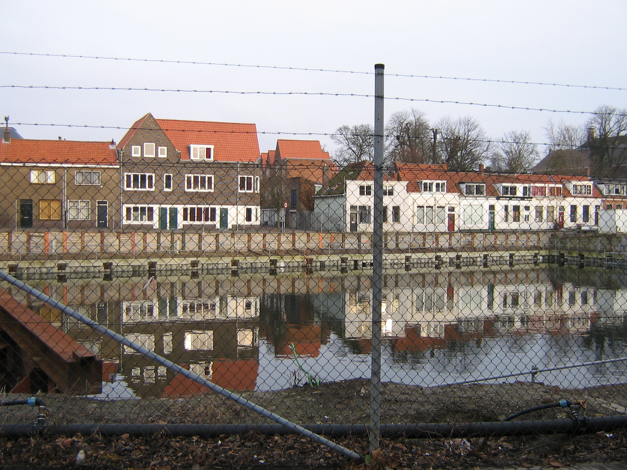 Groôt nutteloos wark: Ondergelopen bouwplaes in Middelburg. Groot nutteloos werk: Onder water gelopen bouwput in Middelburg. Grand traveau inutile: fundaments of a new theatre in Middelburg.